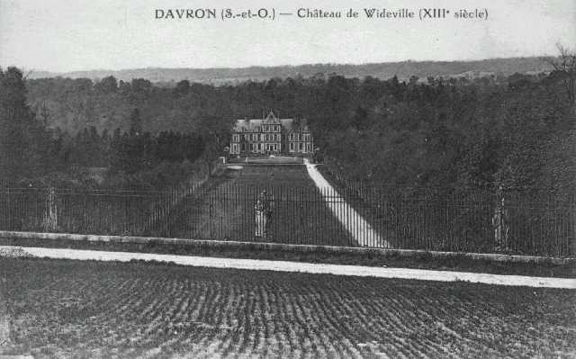 Château de Wideville